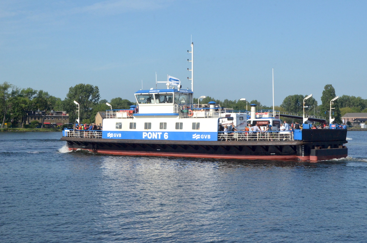 GVB Pont 6 op het Noordzeekanaal bij de Hemkade. Foto: Erik Swierstra.